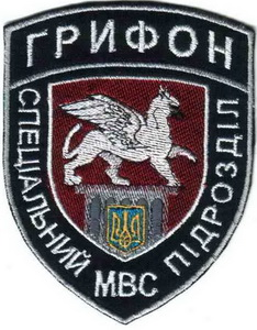 Нарукавний знак спеціальних підрозділів судової міліції «Грифон» Має форму щита із зображенням малого Державного Герба України, колони з грифоном (тулуб лева та голова і крила орла). У верхній частині знака напис "ГРИФОН", з лівої сторони напис "СПЕЦІАЛЬНИЙ" з правої - "ПІДРОЗДІЛ", у нижній частині - "МВС".